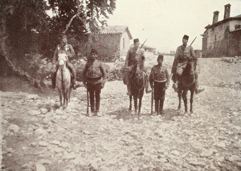 Gendarmería otomana en Macedonia.